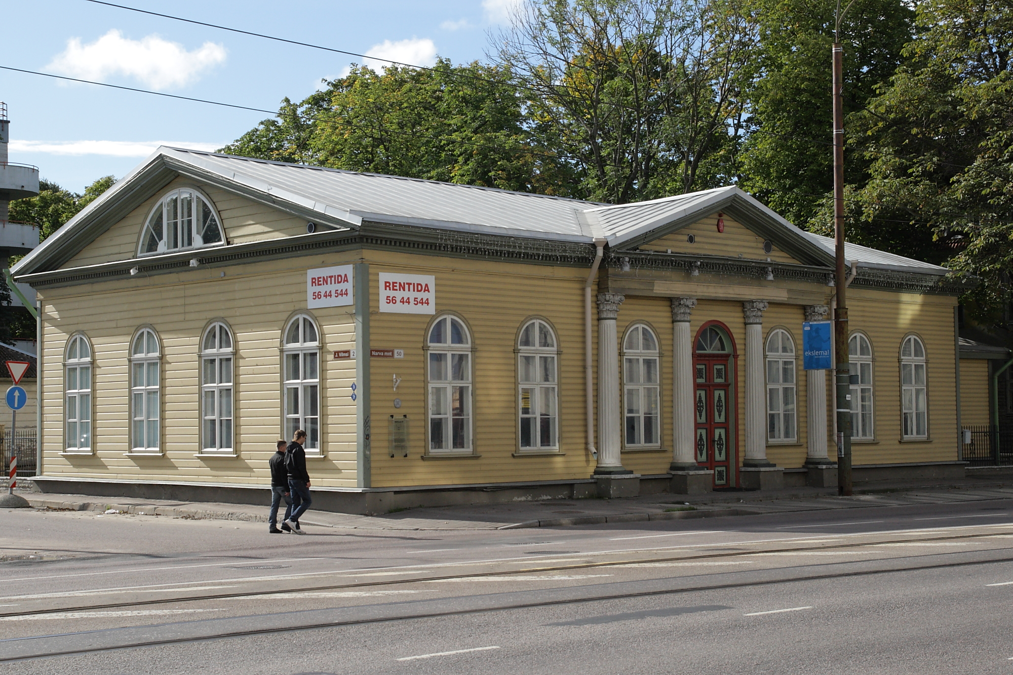 Tallinn, maja, kus alates 1873. aastast asub apteek